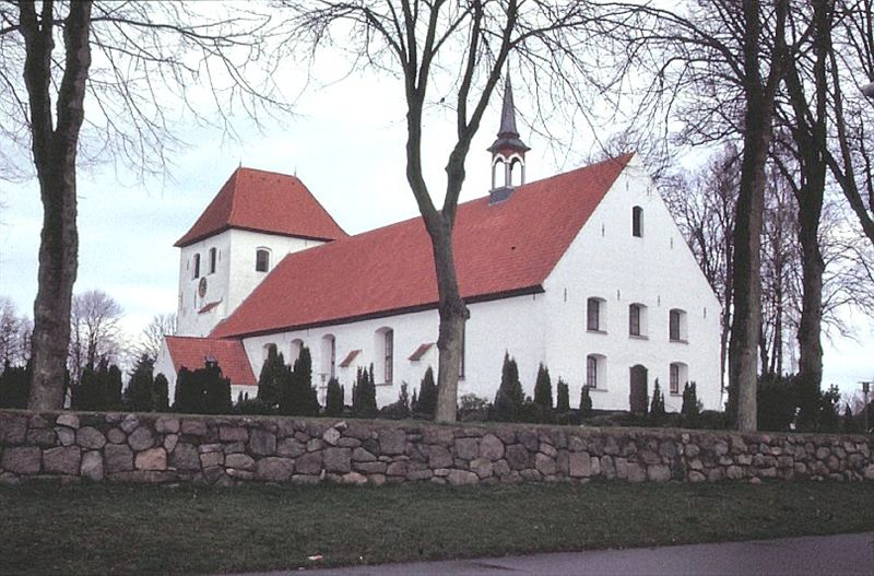 Ulkebøl Kirke i Danmark. Ulkebøl kirke